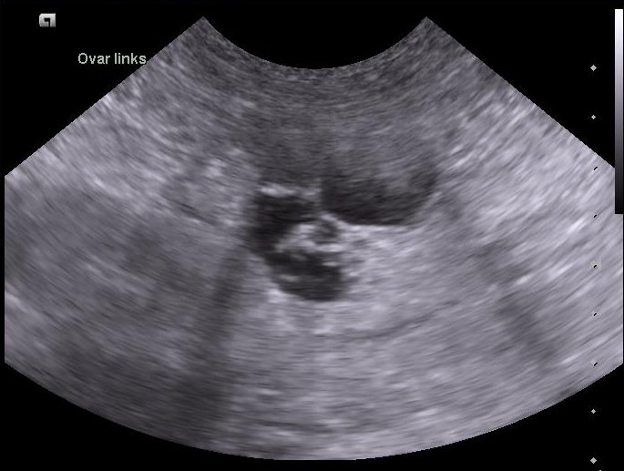 Sonographische Darstellung; mehrere Zysten am Ovar einer Hündin